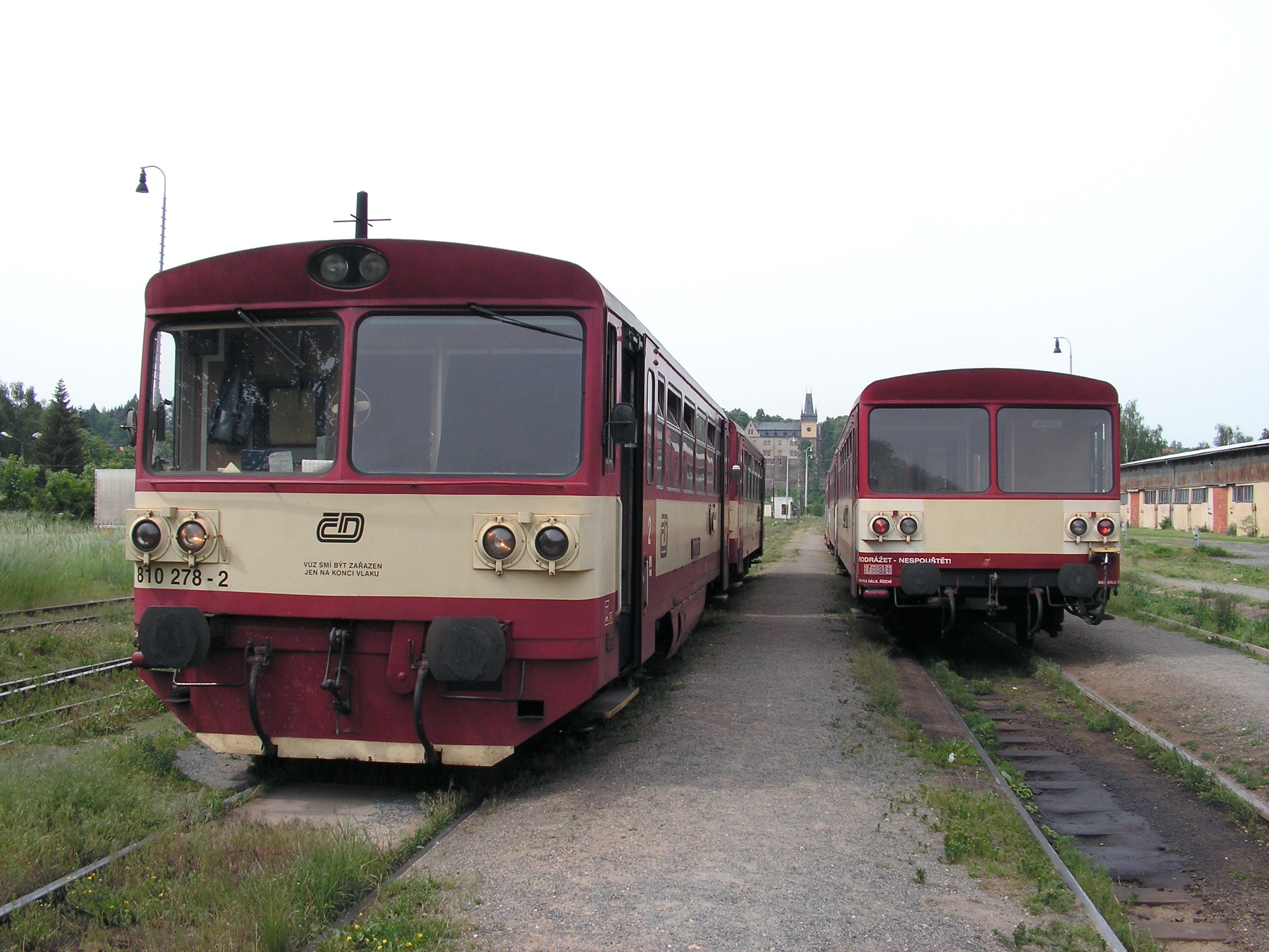 Motorový vůz 810.278-2 ČD na nádraží ve Zruči nad Sázavou.